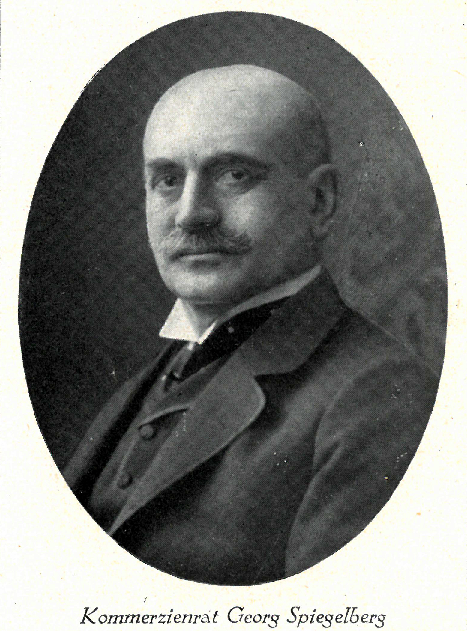 Der Bankier und Kunstsammler Georg Spiegelberg (1848-1913) wurde 1903 zum Kommerzienrat ernannt und war Namensgeber der Stiftung Kommerzienrat Georg Spiegelberg , die heute einen wertvollen Teil der Kunstschätze der Landesgalerie im Niedersächsischen Landesmuseum Hannover ausmacht ...